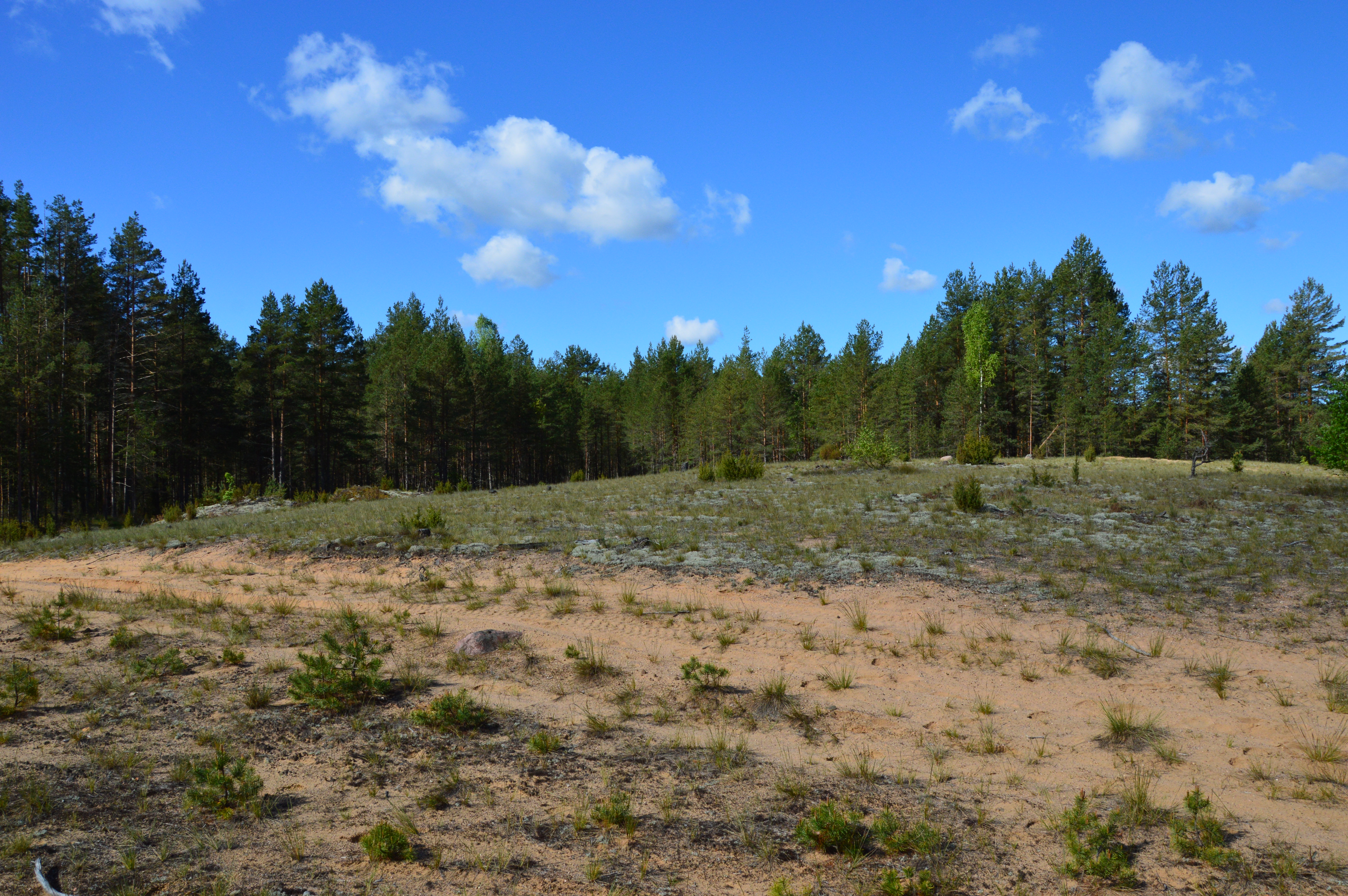 Mustoja MKA, Tinaliiv. Nimetatud ka Setumaa Sahaaraks.